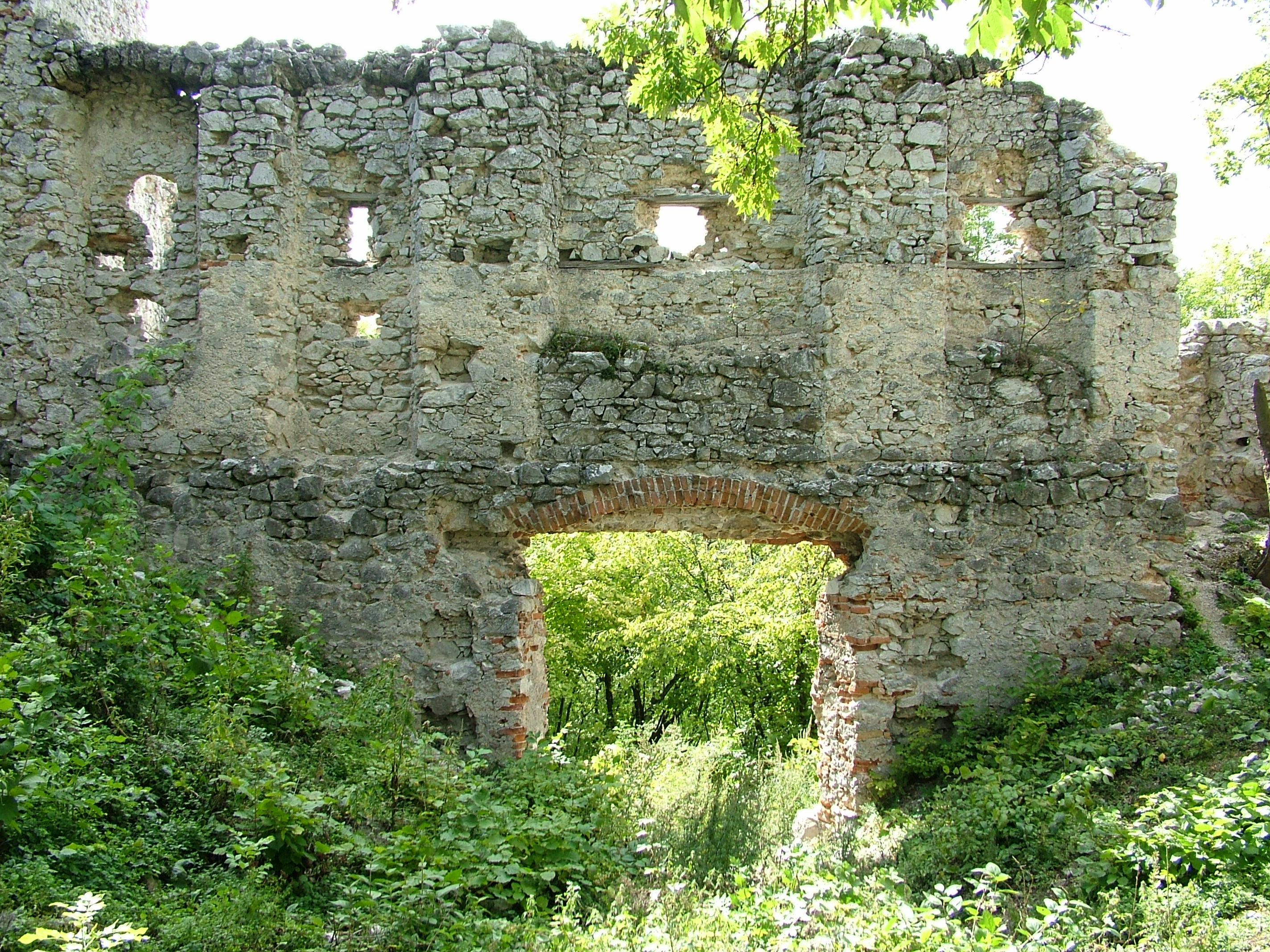 Hrad Tematín